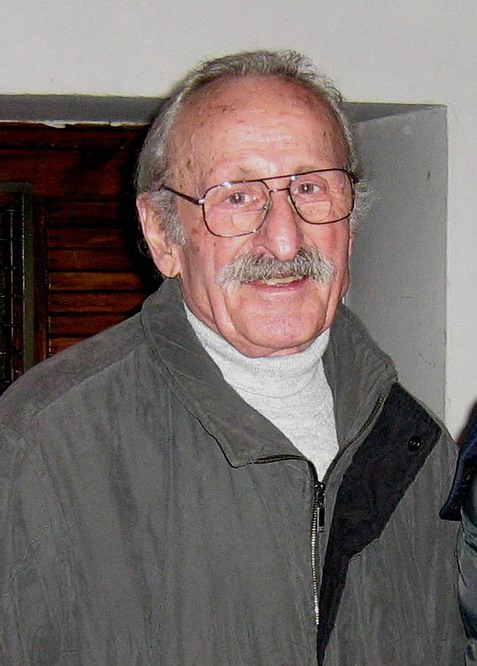 Franciszek Pieczka (ur. 18 stycznia 1928 w Godowie, pow. wodzisławski, woj. śląskie) - polski aktor teatralny i filmowy